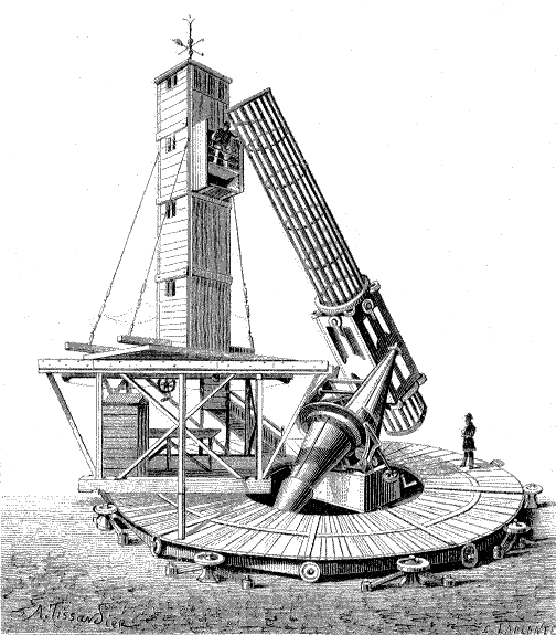 Le télescope de Lassel, dans l'île de Malte pour La Nature, revue des sciences, n° 20, page 309.